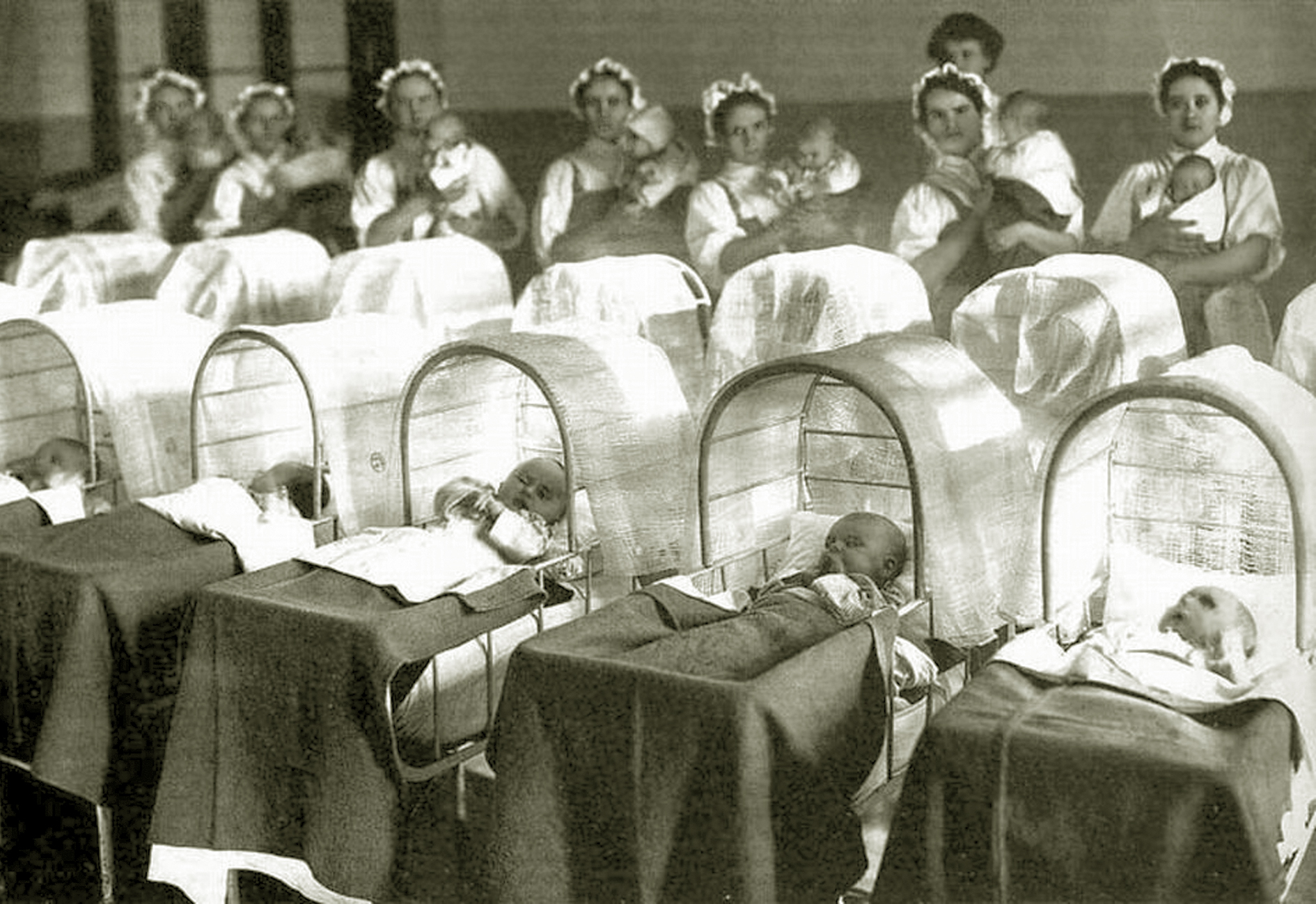 В грудном отделении Воспитательного Дома Петербурга